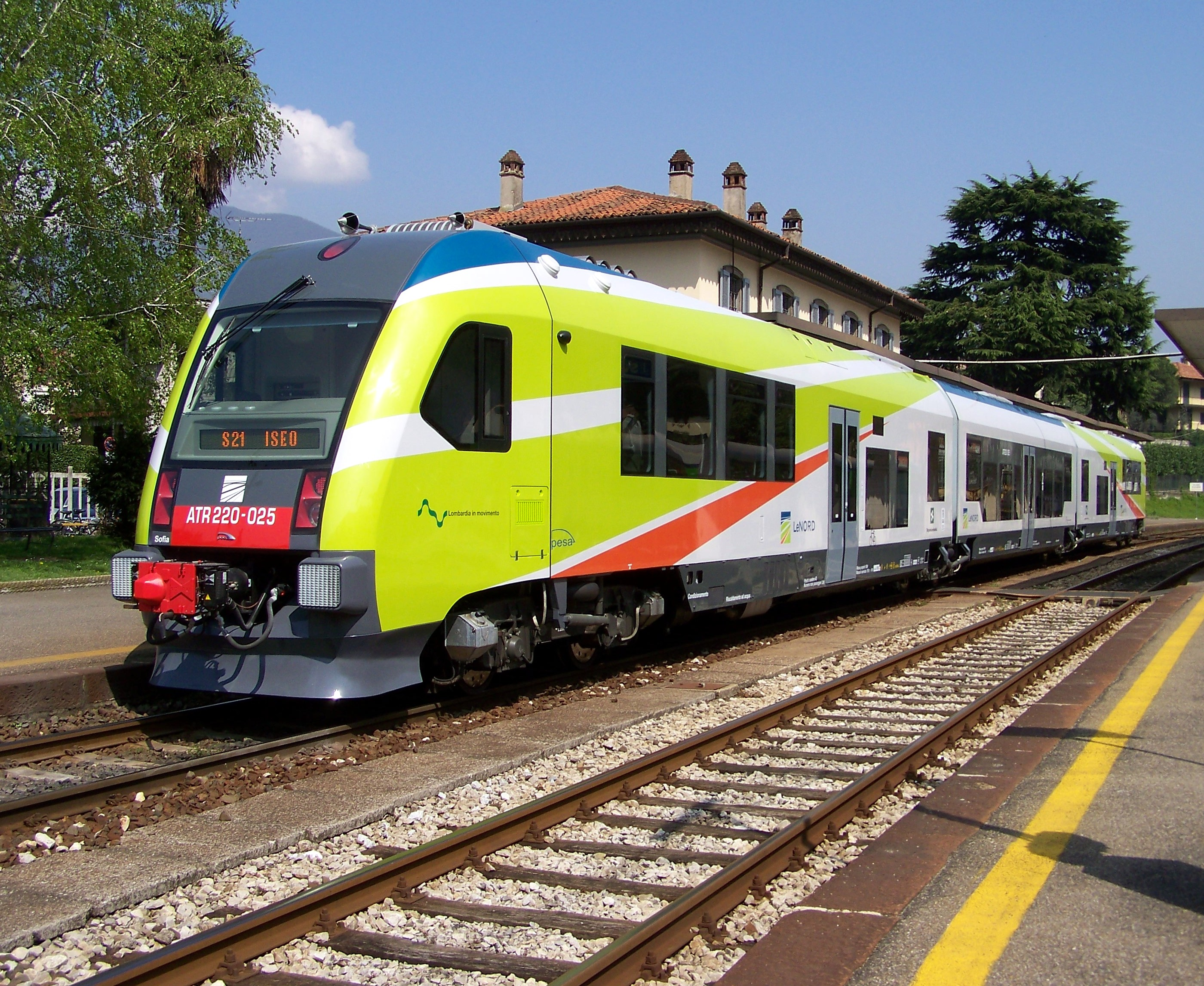 L'ATR 220.025 di LeNord in sosta presso il primo binario della stazione Iseo dopo aver completato il viaggio inaugurale sulla ferrovia Brescia-Iseo-Edolo.